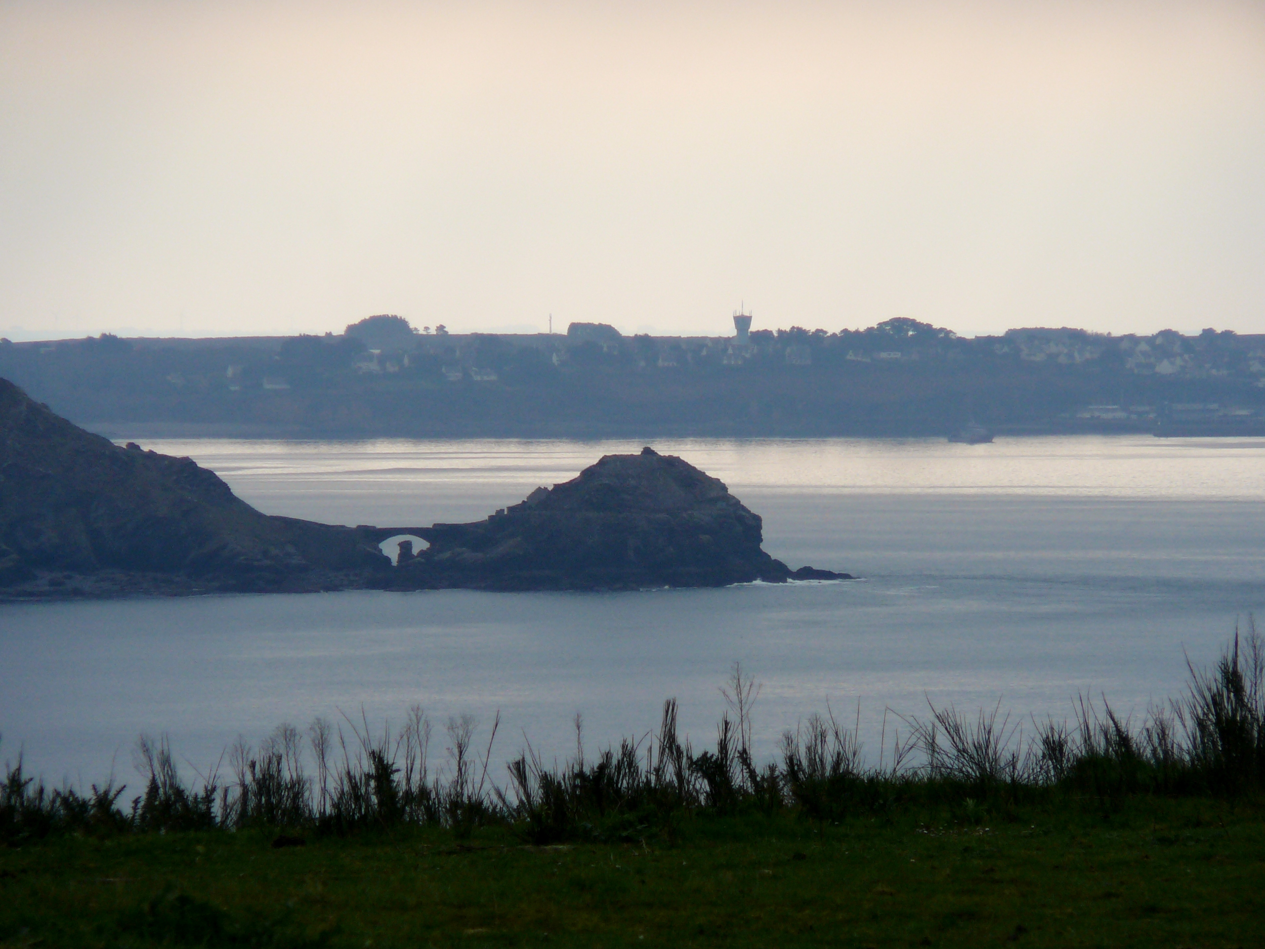 Pointe des Capucins panorama